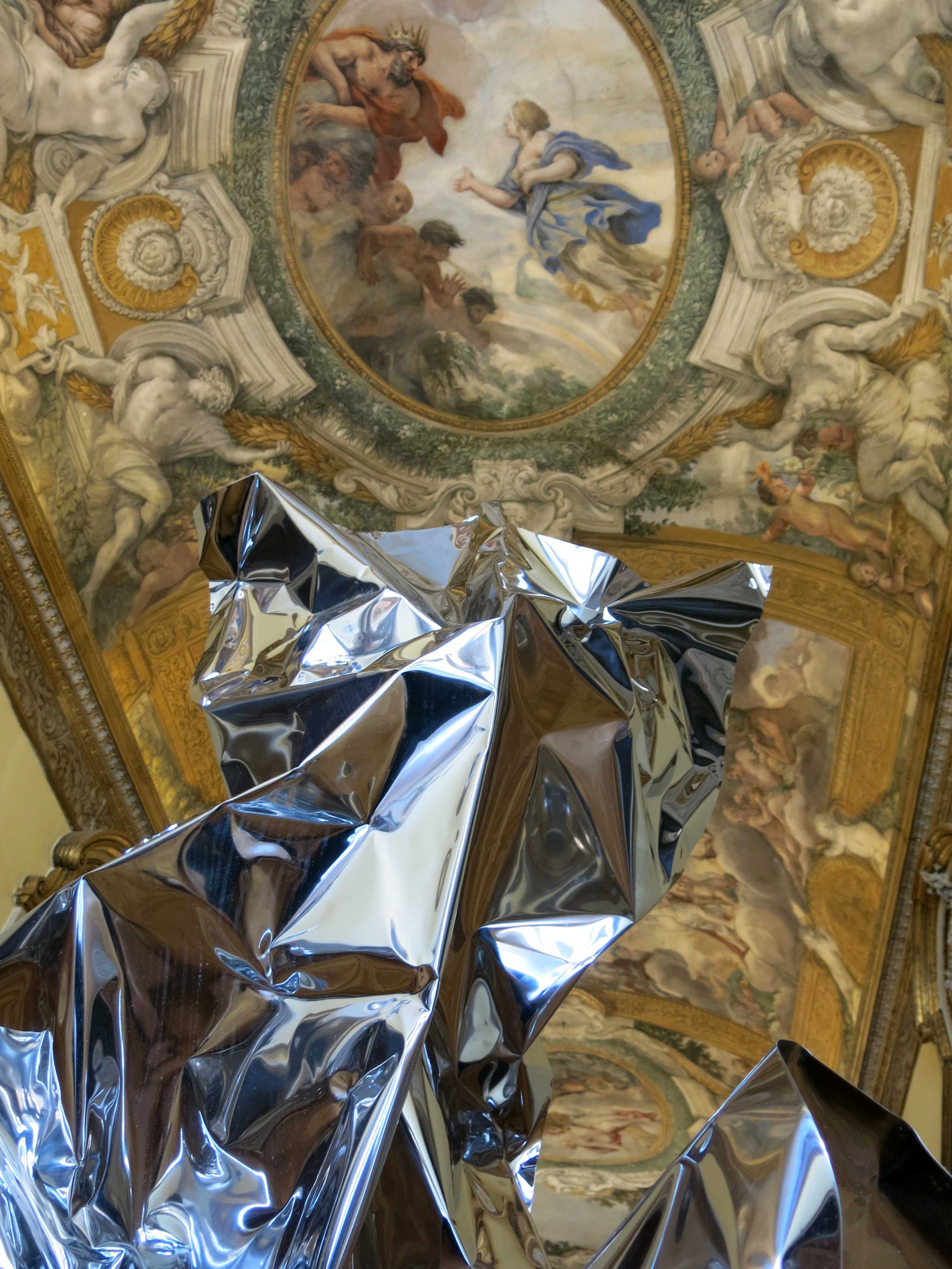 Aldo Chaparro en el Palazzo Pamphilij.